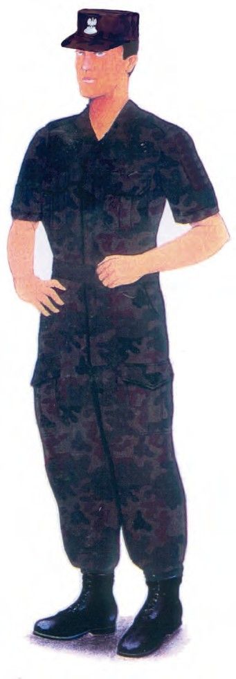 Ubiór polowy funkcjonariuszy noszących umundurowanie Wojsk Lądowych z koszulą polową i spodniami polowymi oraz czapką polową